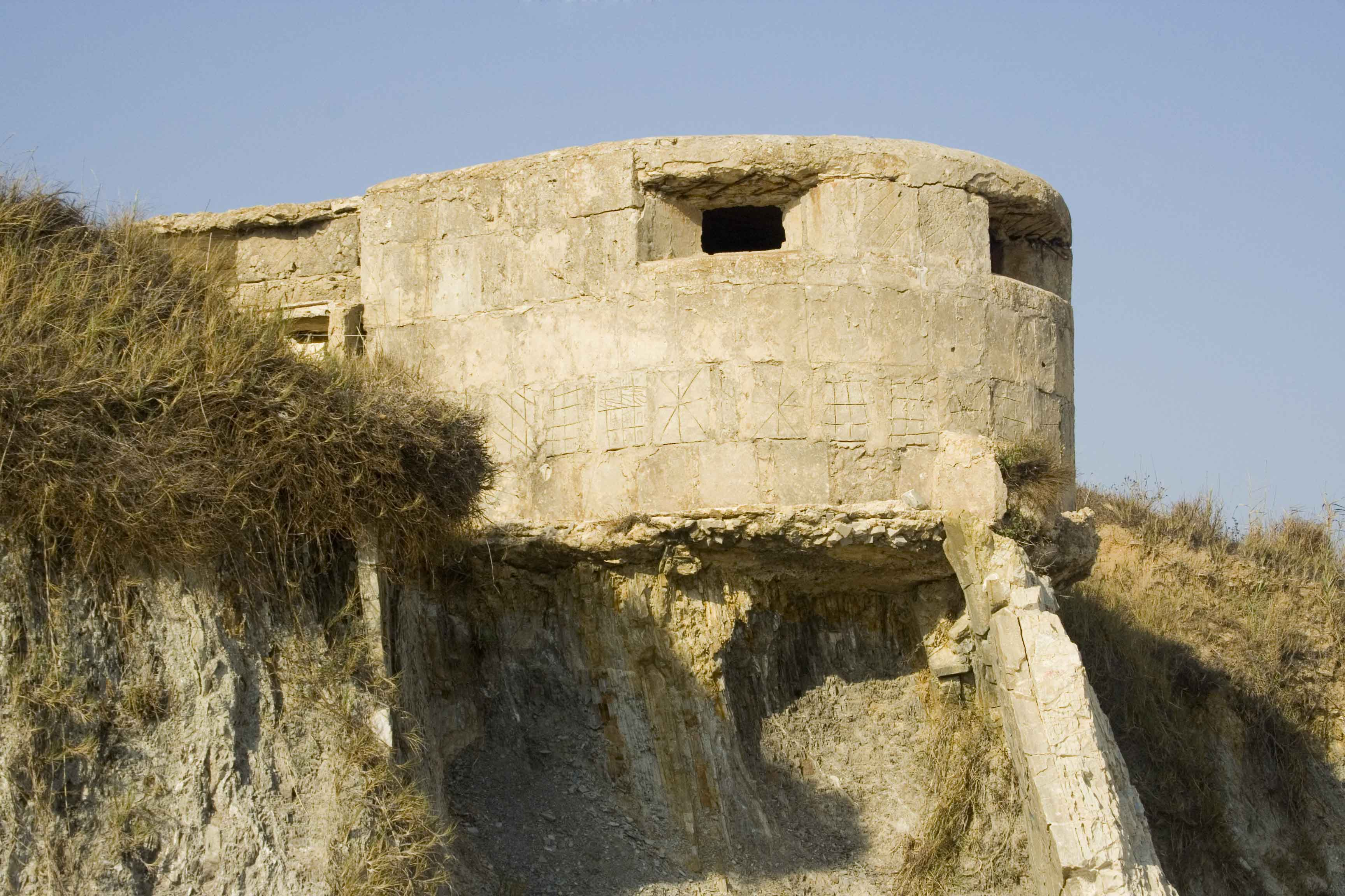 Fortin militar español en la playa de Tarifa (circa 1941)bunker-1